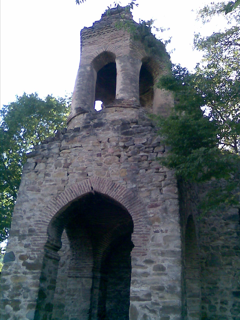 უსანეთის ეკლესია